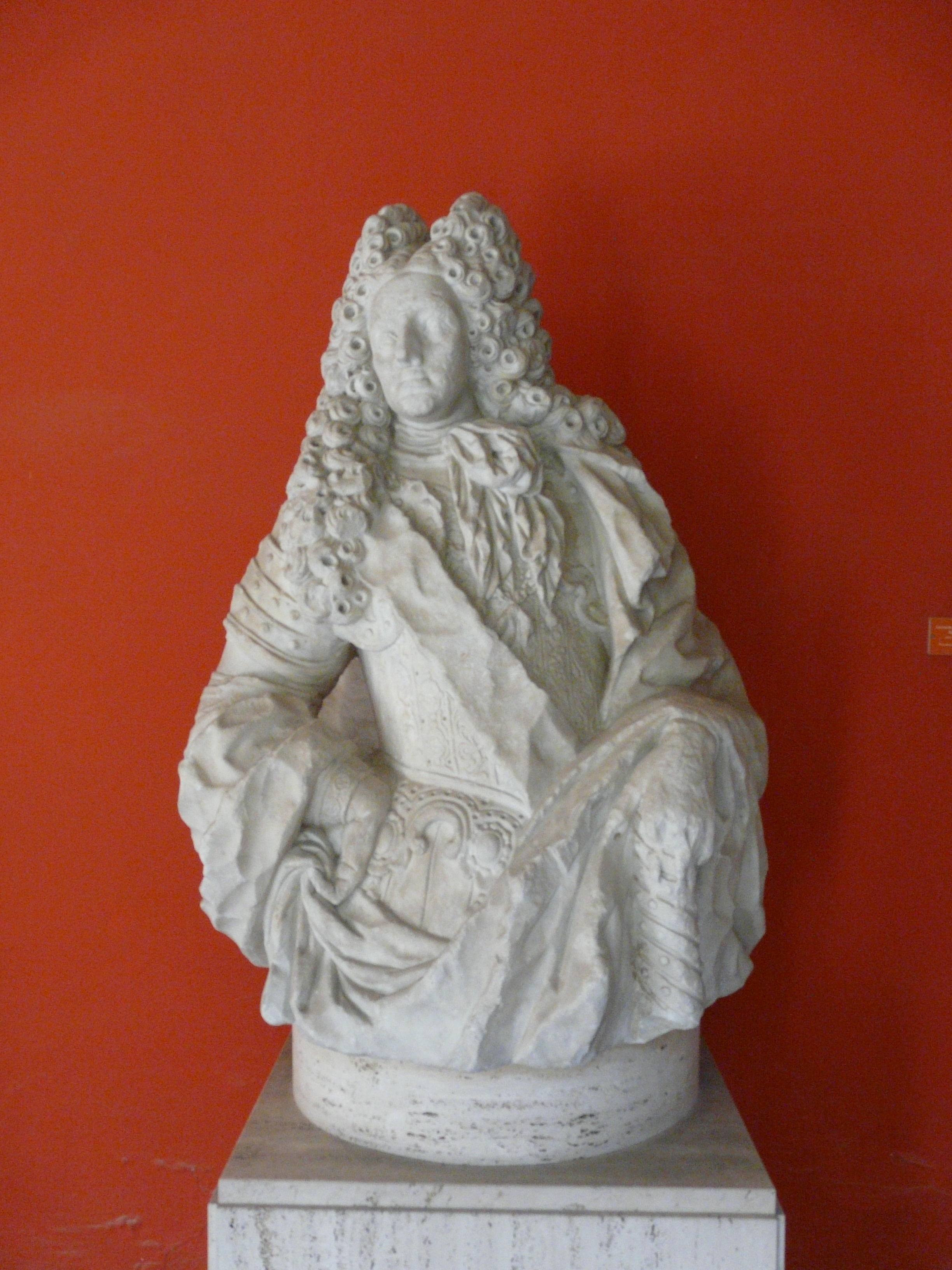 Museu de Belles Arts de València. Felip V per Lleonard-Juli Capuz, de cap el 1714, procedent del pla de l'Albereda de València. Object location39° 28′ 45.13″ N, 0° 22′ 13.91″ W